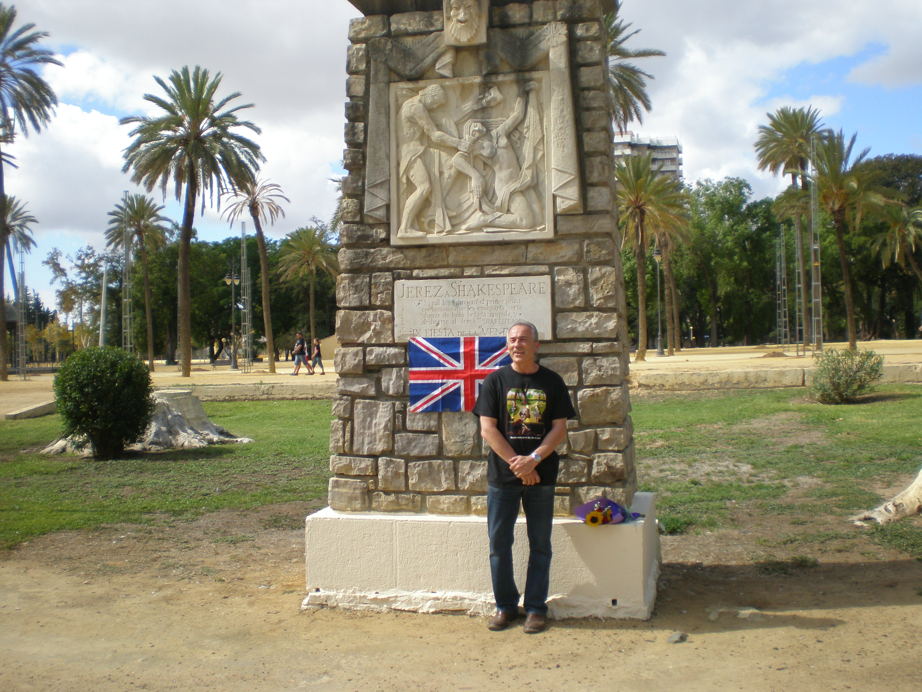 Homenaje a Shakespeare junto al monumento existente en el Parque González Hontoria. Foto: José Luis Jiménez García.